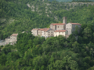 Casteldelci. Autore: Marco Brogi